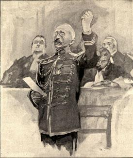 Dreyfus au procès de Rennes - Affaire Dreyfus